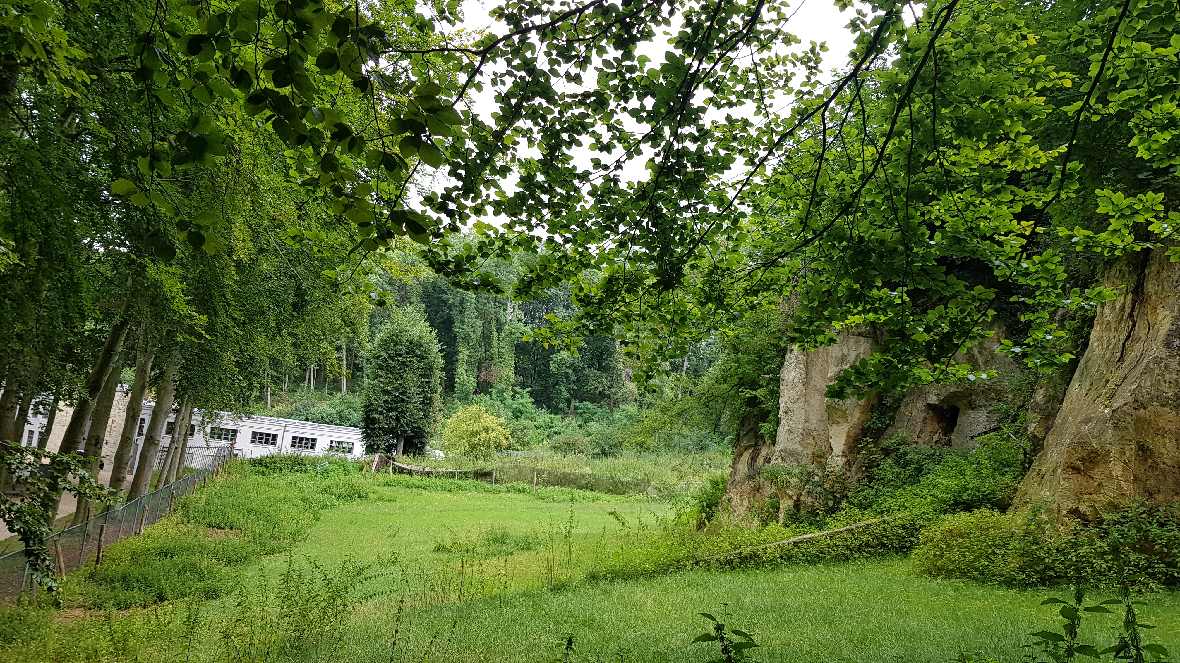 Oude Groeve Sint-Joseph, Cadier en Keer, Nederland